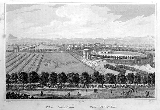 La Piazza d'Armi (l'attuale Parco Sempione) di Milano, con l'Arena, in un'incisione di Audot da: L'Italie (...), Paris, Audot Fils, 1834-1837.